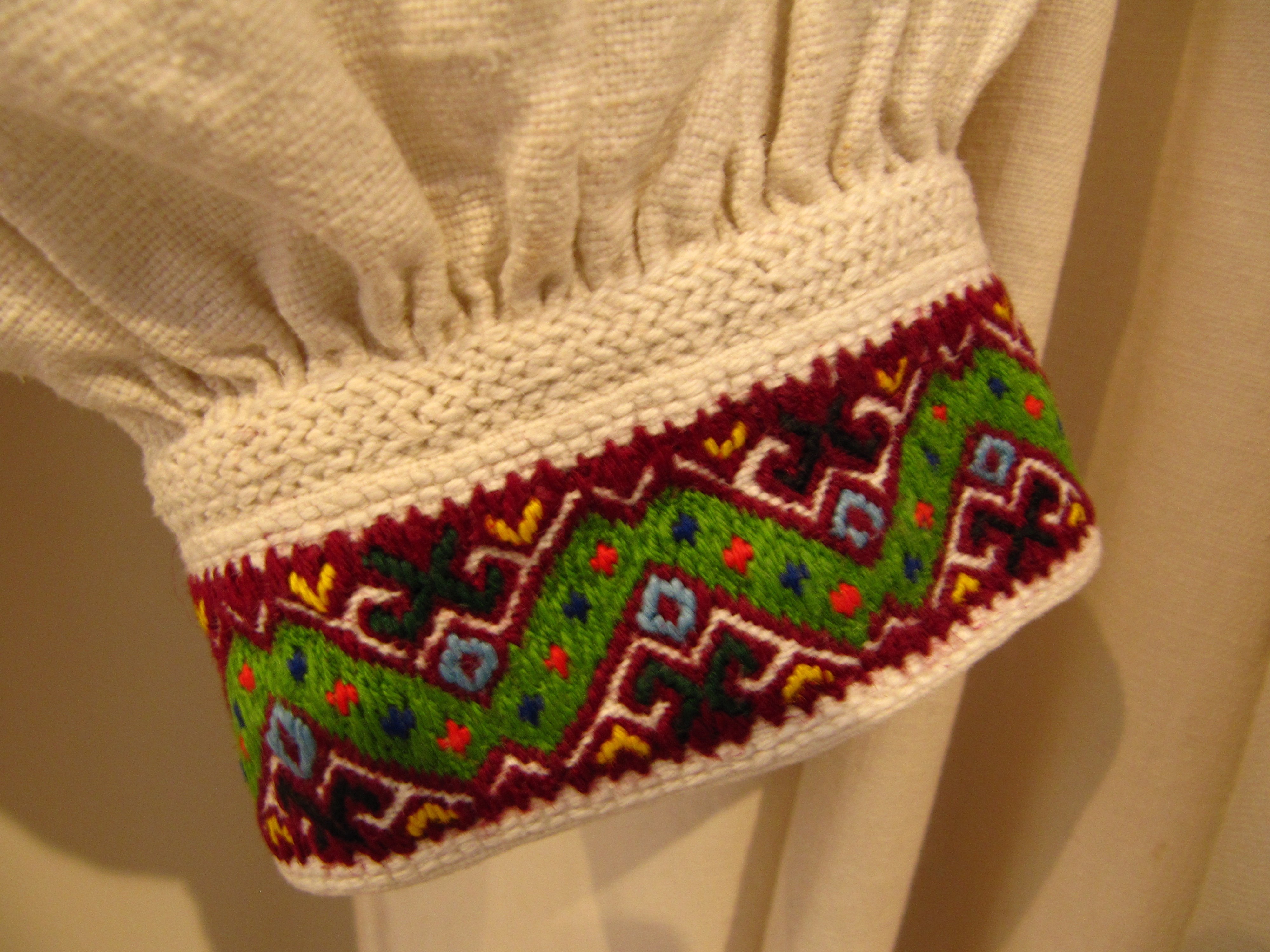 Жіноча сорочка. Початок 20 ст. Івано-Франківська обл. Косівський р. с. Соколівка. Виставка в музеї Івана Гончара (Київ).